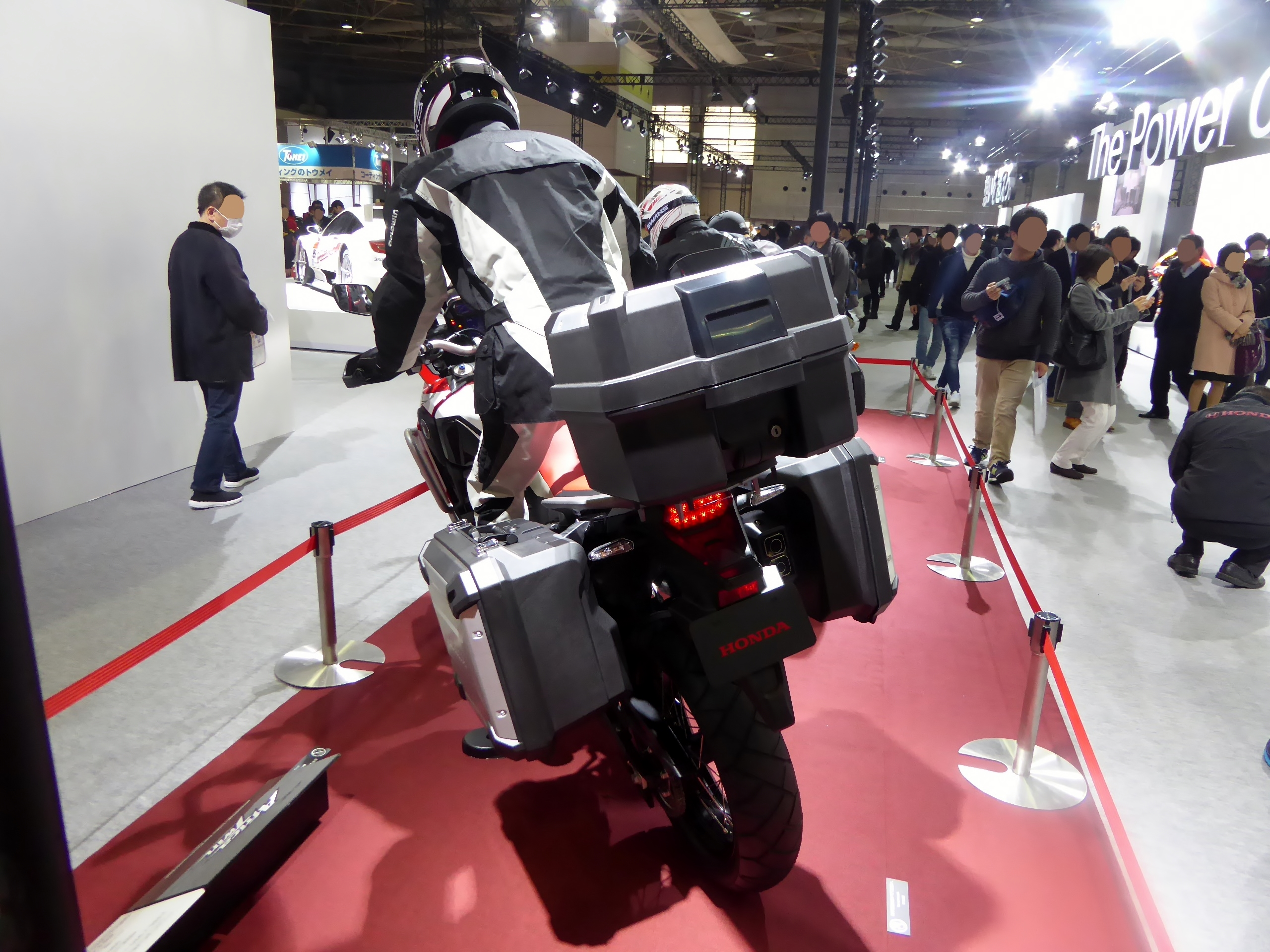 大阪モーターショー2015においてホンダ・CRF1000Lアフリカツインを撮影。